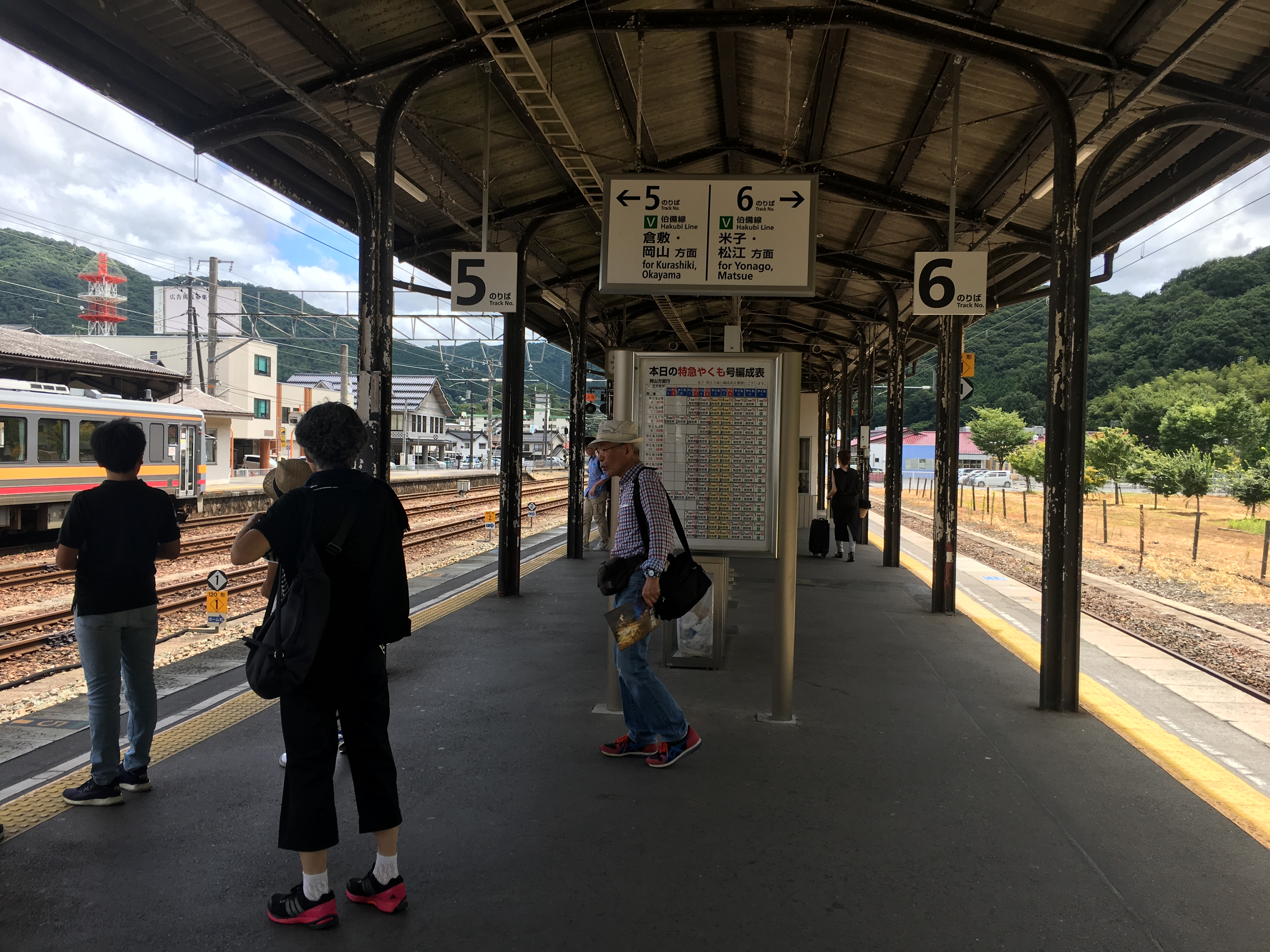 Niimi Station (新見駅)